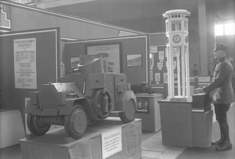 Eröffnung der grossen internationalen Polizeiausstellung in Berlin! wurde am 25. September 1926 durch den preussischen Innenminister Severing eröffnet. Die Ausstellung ist die grösste dieser Art in der Welt. Blick in die Abteilung Verkehrs-und Sicherheits-Polizei: Im Vordergrund: das Modell eines Panzerwagens, dahinter: das Miniaturmodell eines Verkehrsturmes.